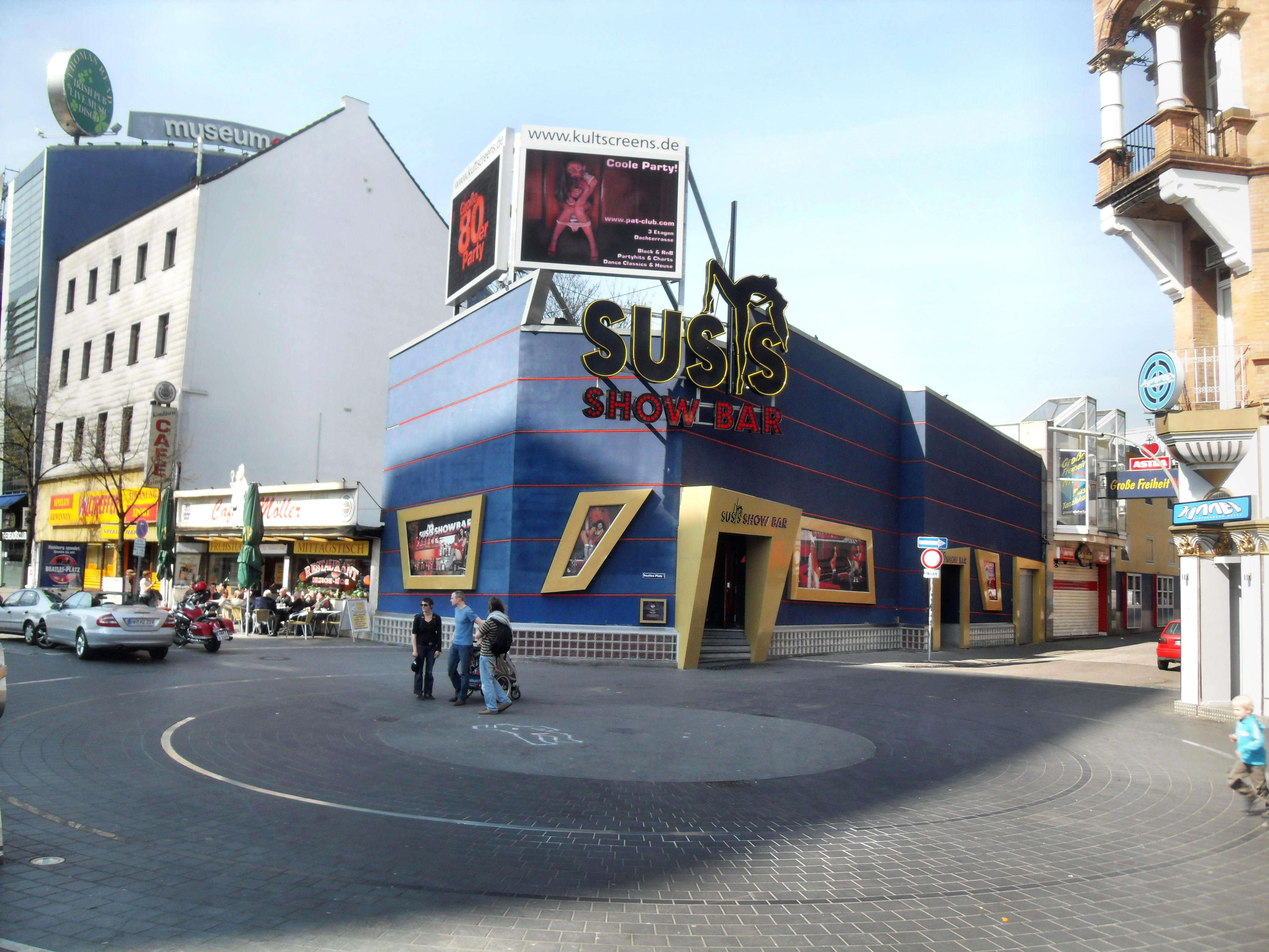 Der Beatles-Platz in Hamburg-St. Pauli in Deutschland